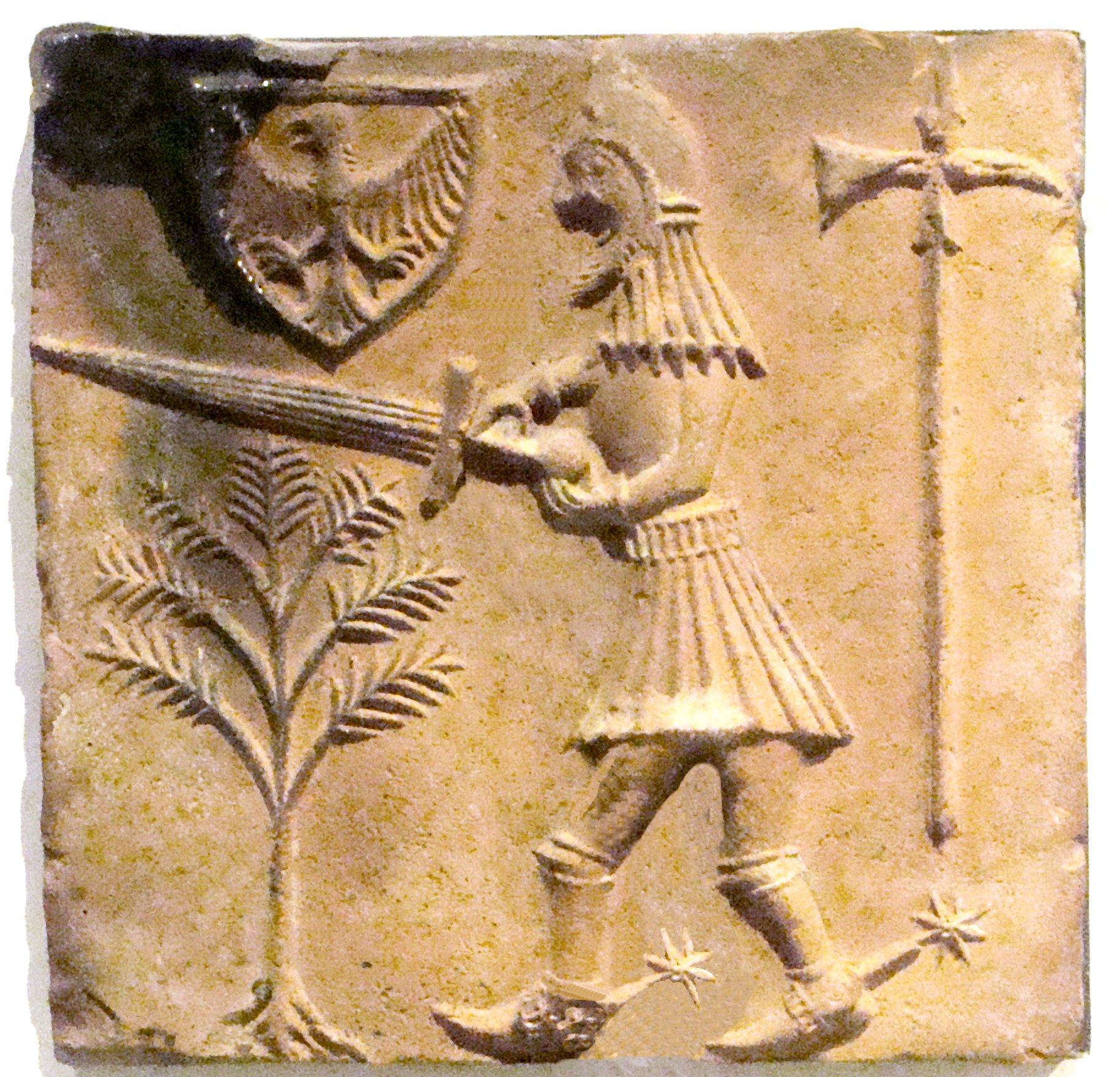 Kafel płytowy gotycki z XV w. z Jankowa. Muzeum Początków Państwa Polskiego w Gnieźnie